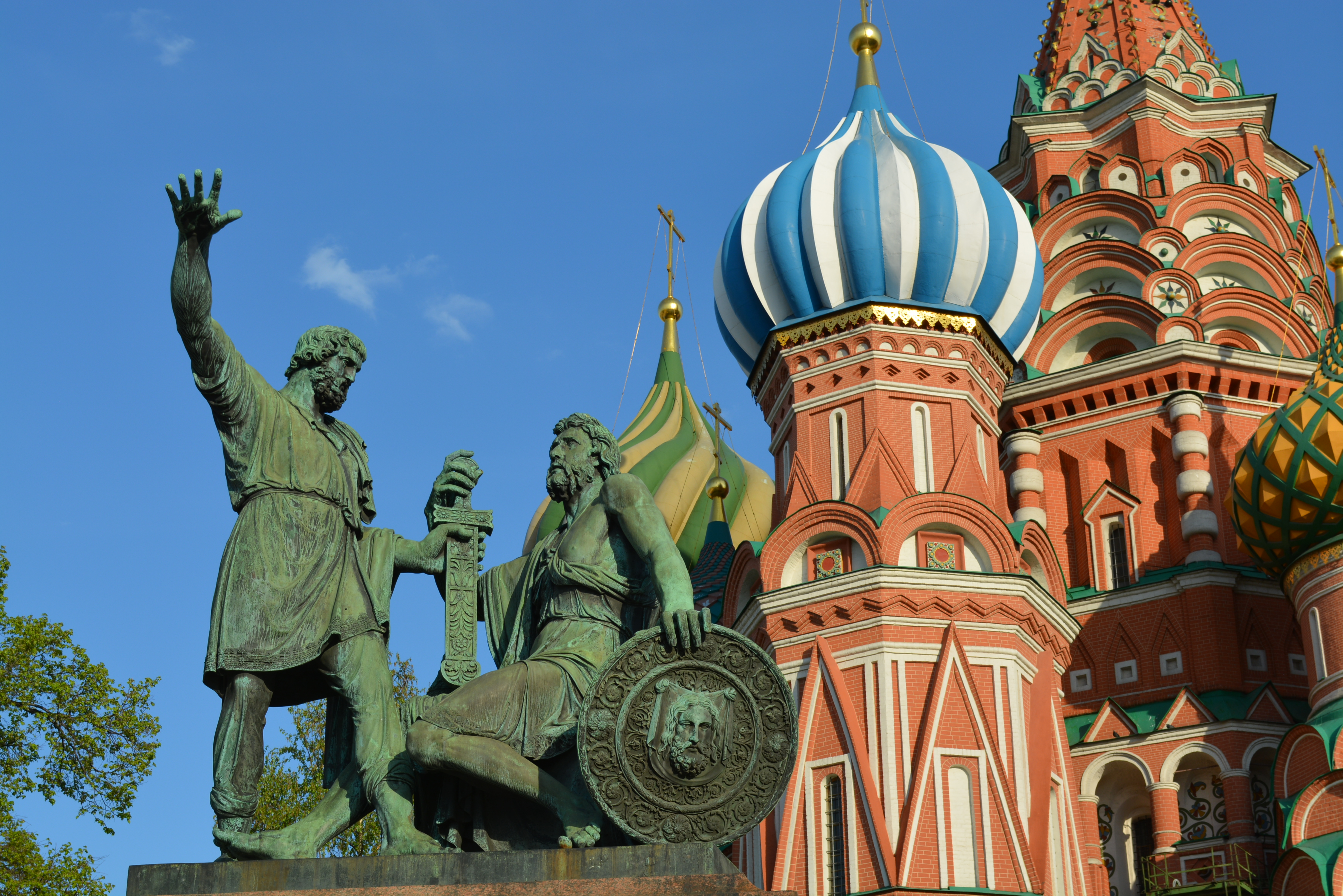 El Monumento a Minin y Pozharsky (ruso: Па́мятник Ми́нину и Пожа́рскому) es una estatua de bronce en Plaza Roja en Moscú, Rusia ubicada al frente de la Catedral de San Basilio.